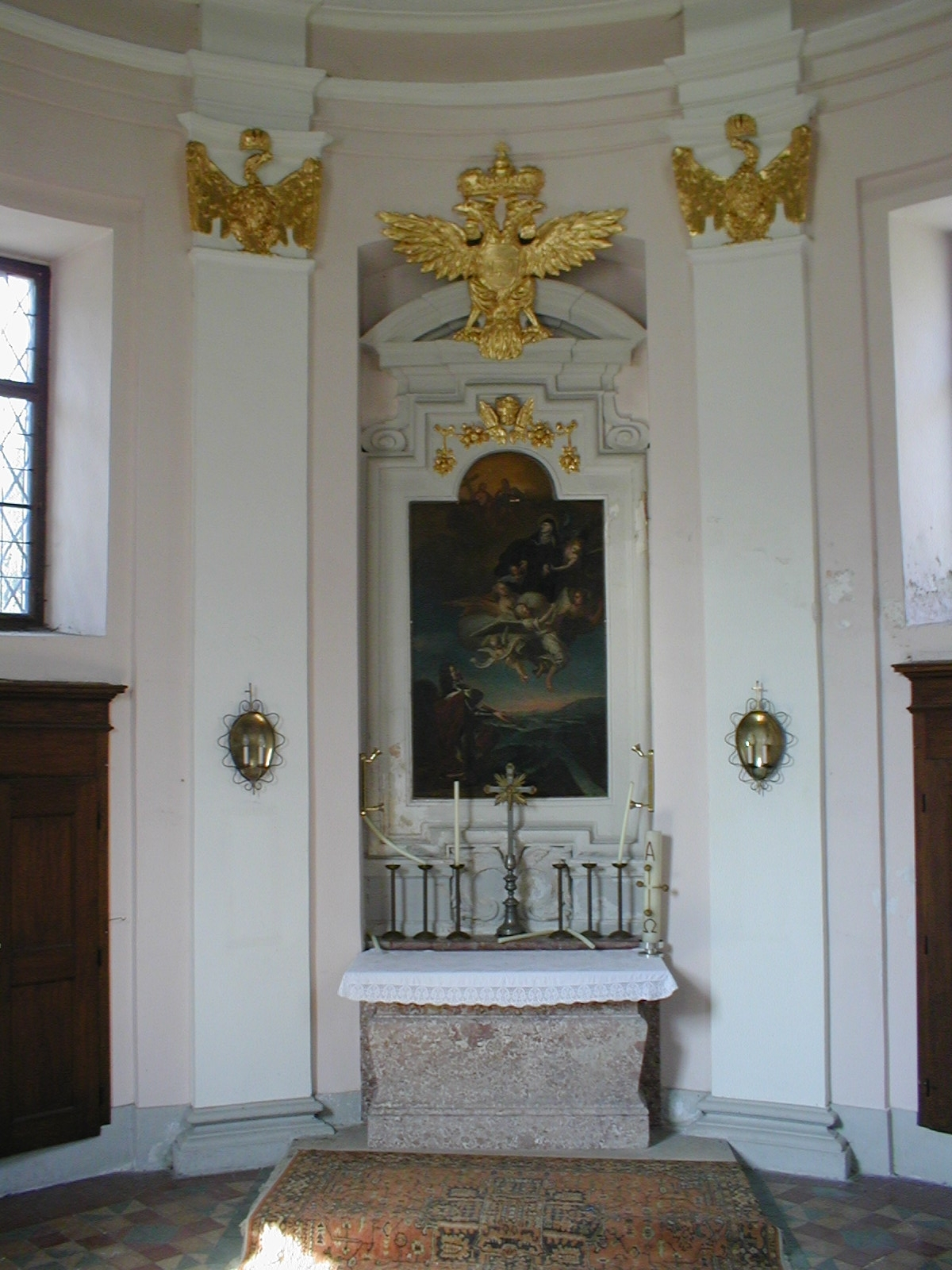 Innenraum mit Altar der Brigittakapelle in Wien